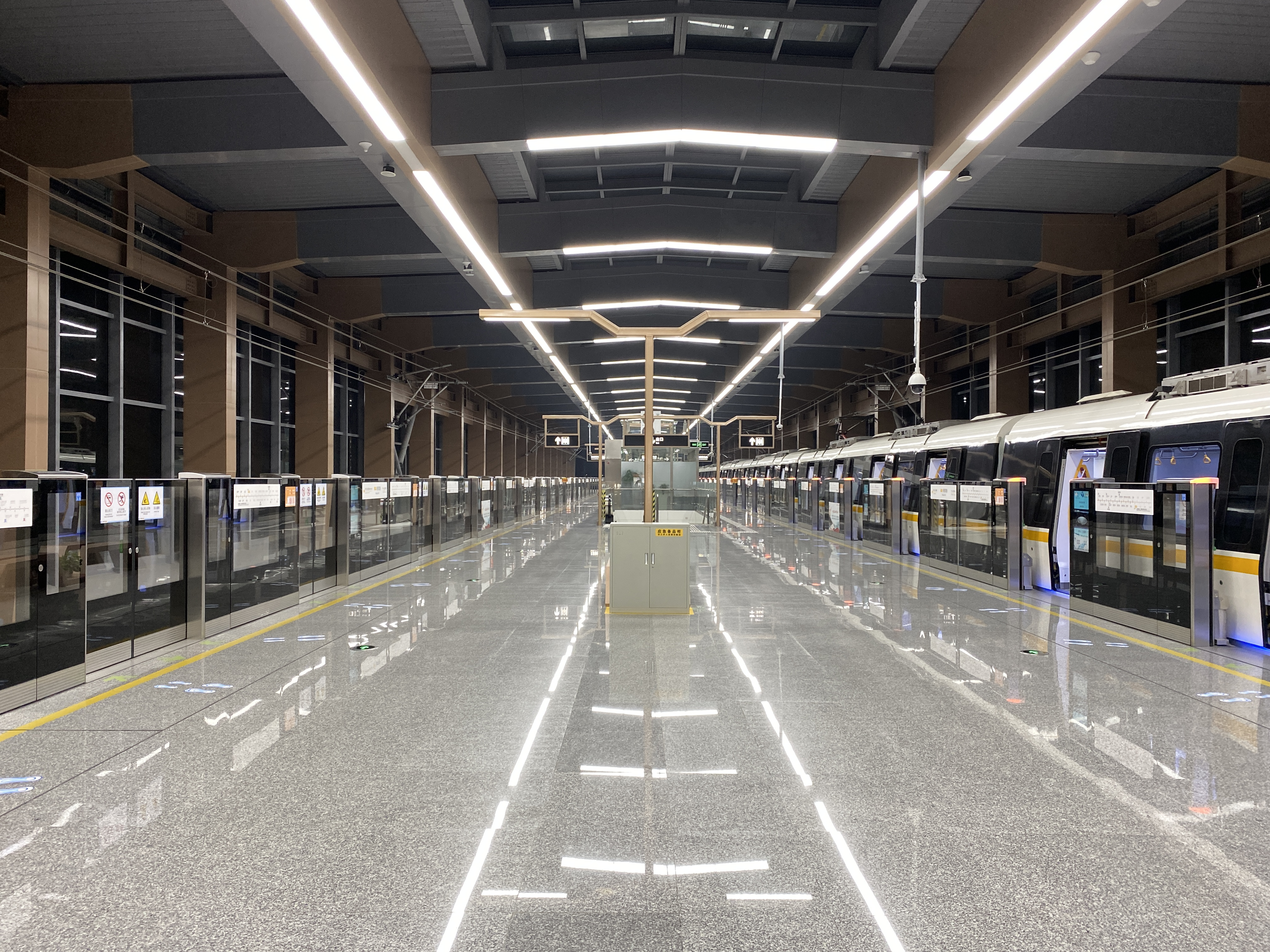 明辉路站站台